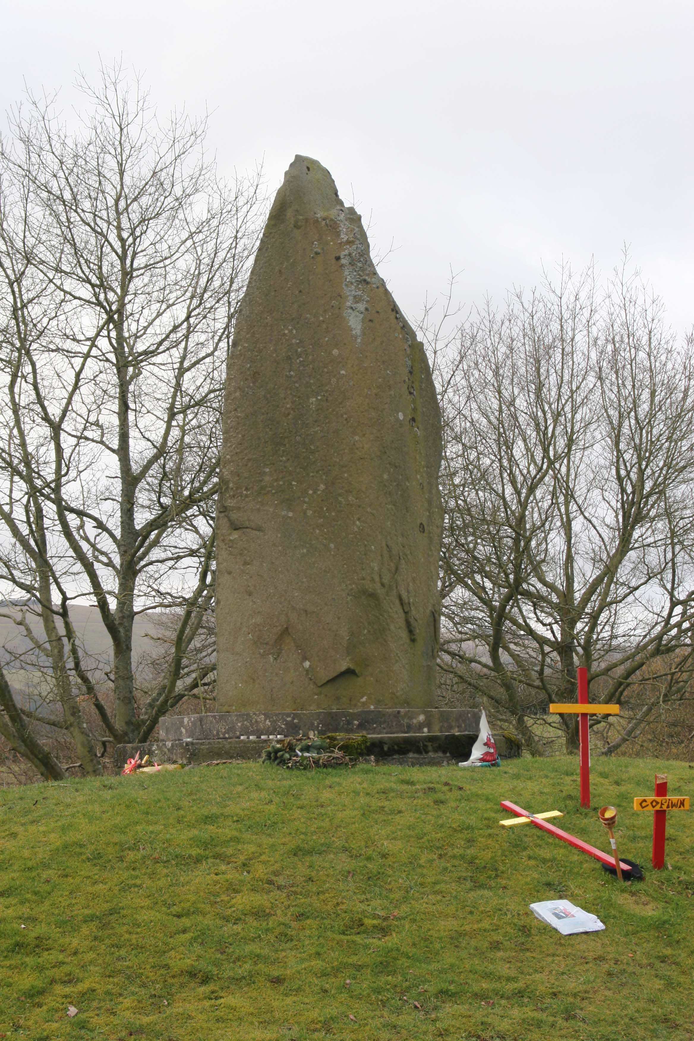 Llywelyn Monument, Cilmeri 10/03/2006 Rhion Pritchard